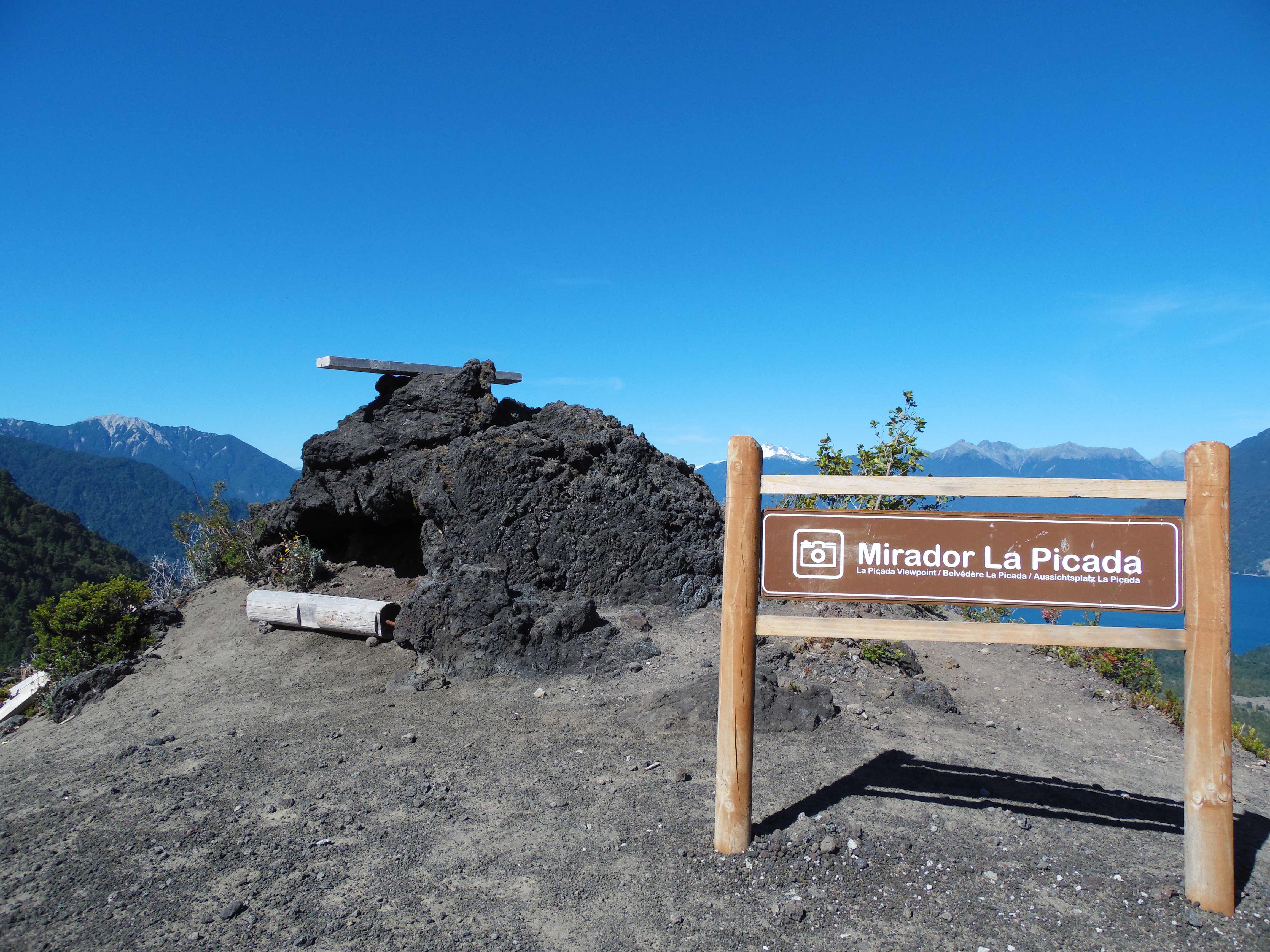 Mirador La Picada. Parque Nacional Vicente Pérez Rosales, Región de Los Lagos, Chile.